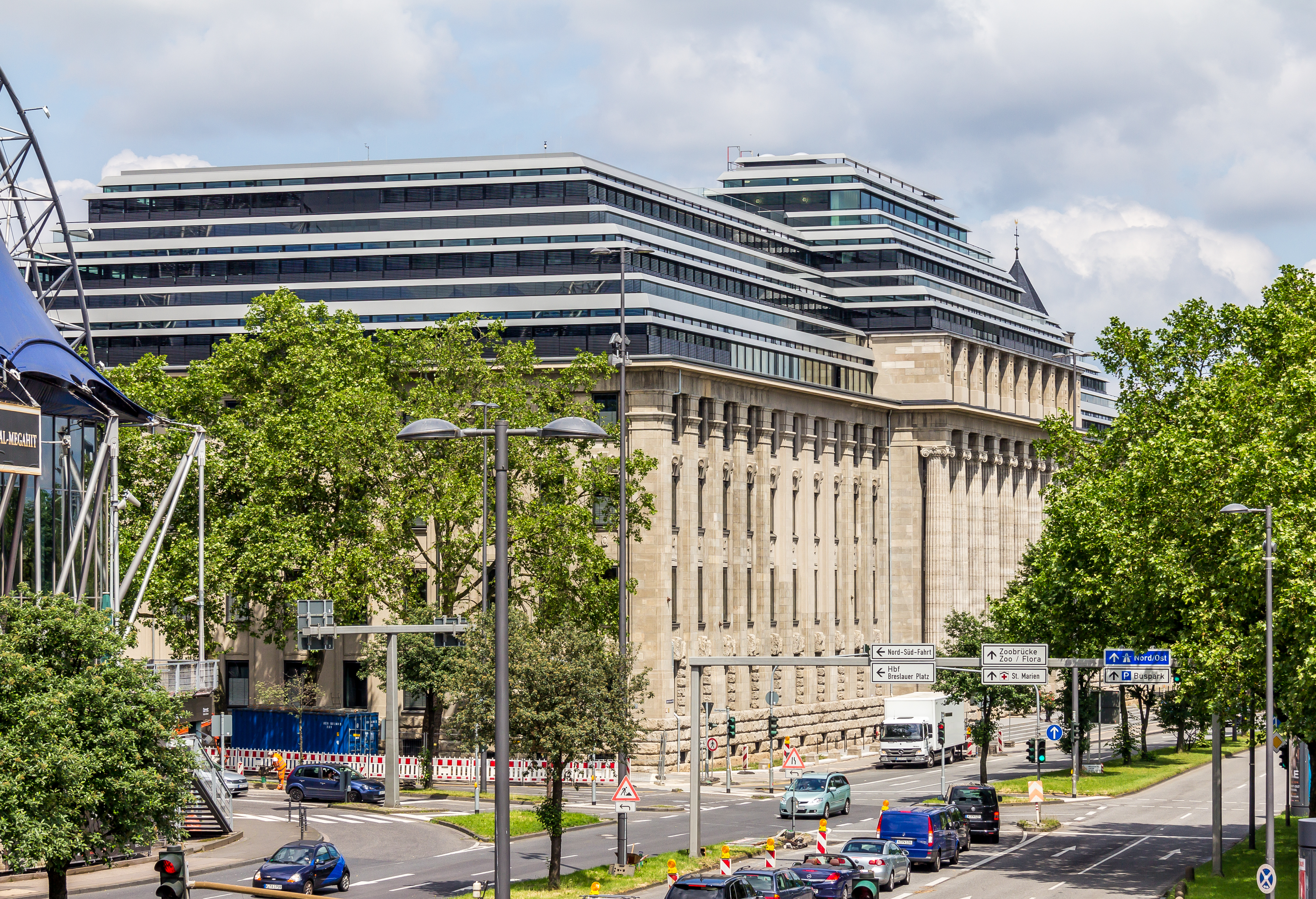 „Neue Direktion Köln“, die alte Reichsbahndirektion Köln, nach dem erfolgtem Umbau, nun mit 3 zusätzlichen Staffelgeschossen